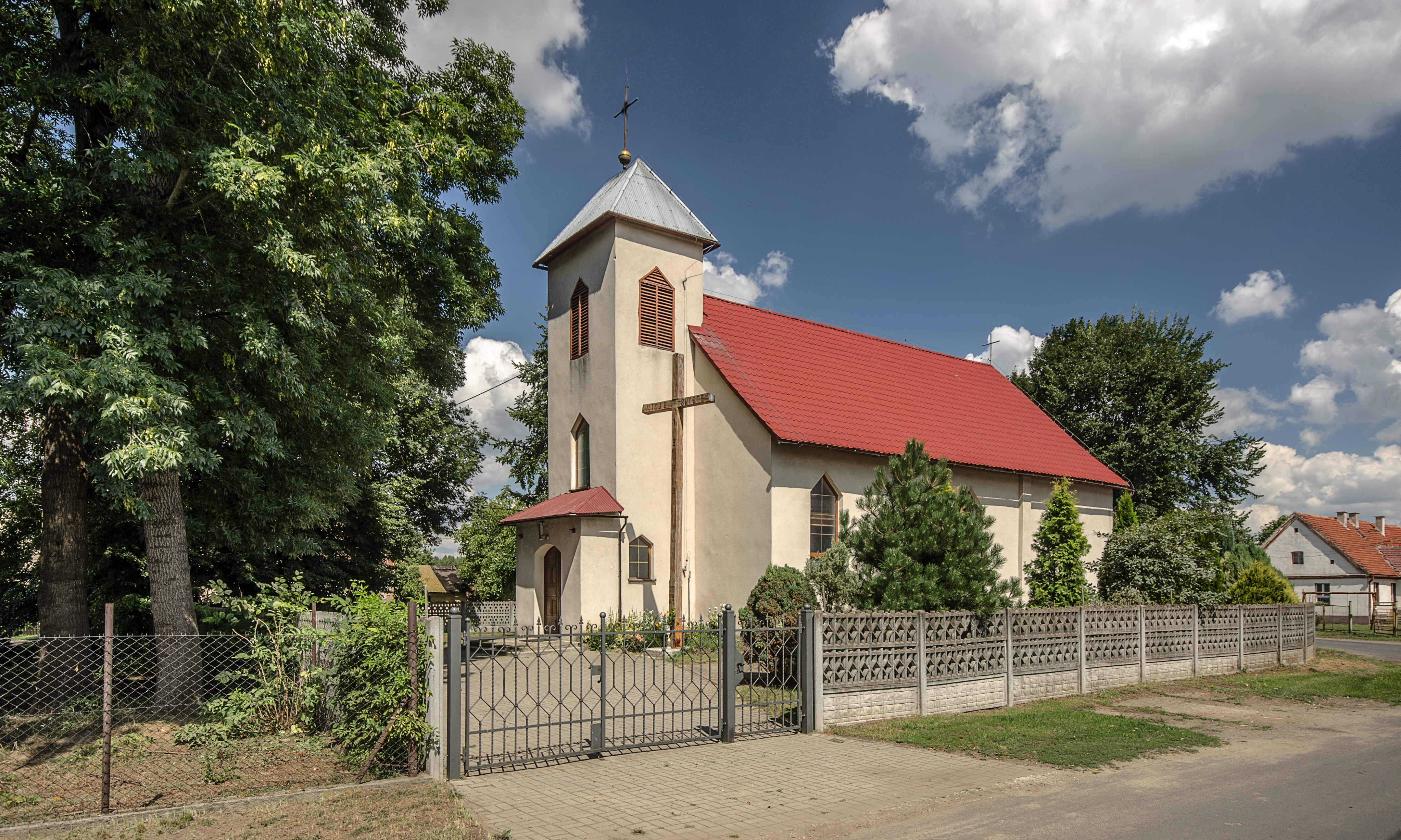 Kościół Matki Boskiej Częstochowskiej we wsi Prędocin, pow. brzeski, woj. opolskie